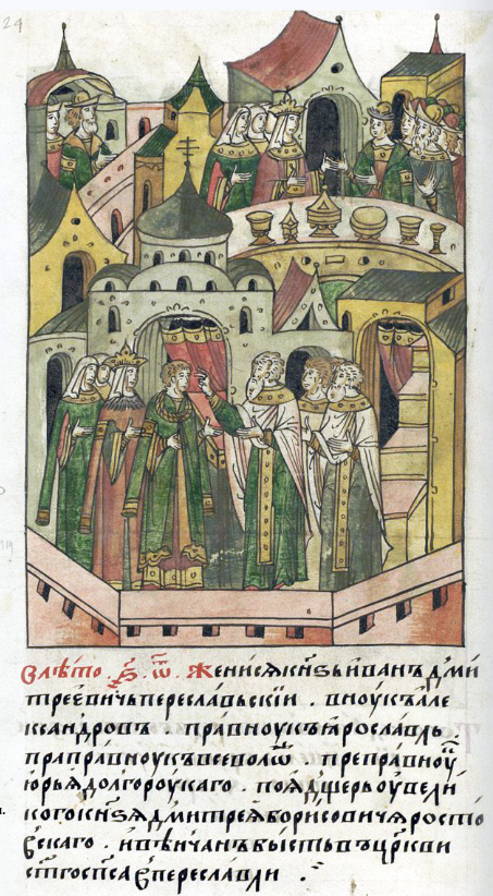 ЛИЦЕВОЙ ЛЕТОПИСНЫЙ СВОД В 6800 году. Женился князь Иван Дмитриевич Переславский, внук Александров, правнук Ярославов, праправнук Всеволодов, преправнук Юрия Долгорукого, взял дочь у великого князя Дмитрия Борисовича Ростовского и венчан был в церкви святого Спаса в Переславле.